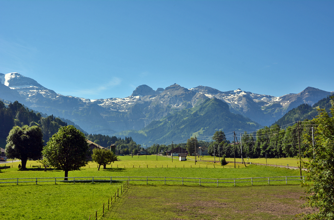 Lenk im Simmental